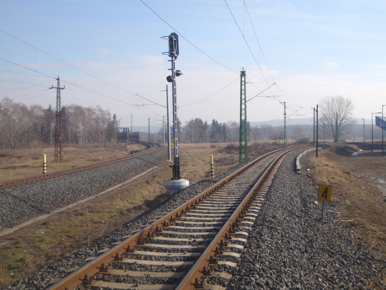 Zalaegerszegi deltavágány, épült 2004-ben